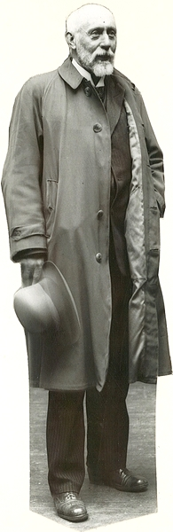 portrett, mann, kunstmaler, stående helfigur.